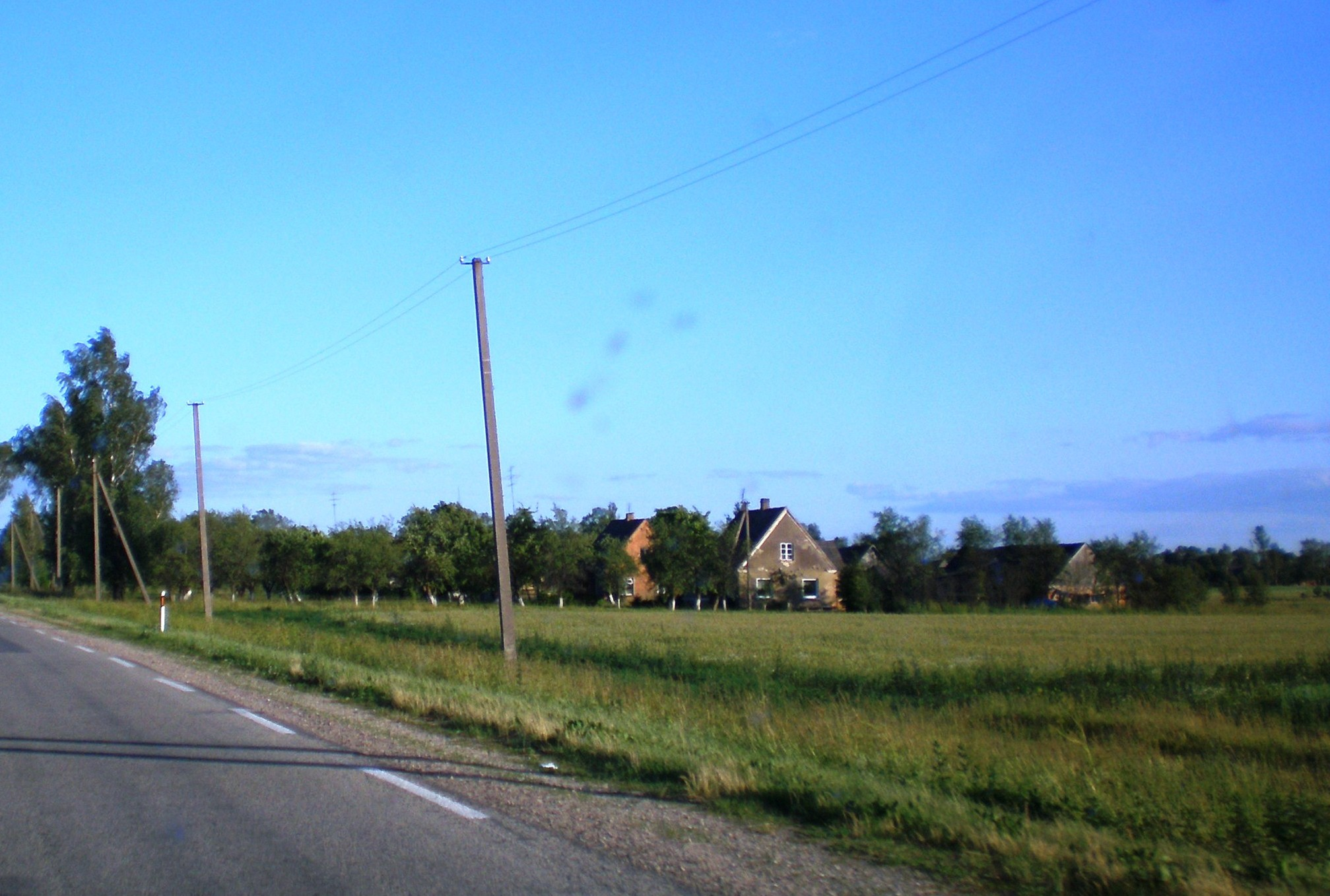 Jokūbiškiai, Biržų raj.